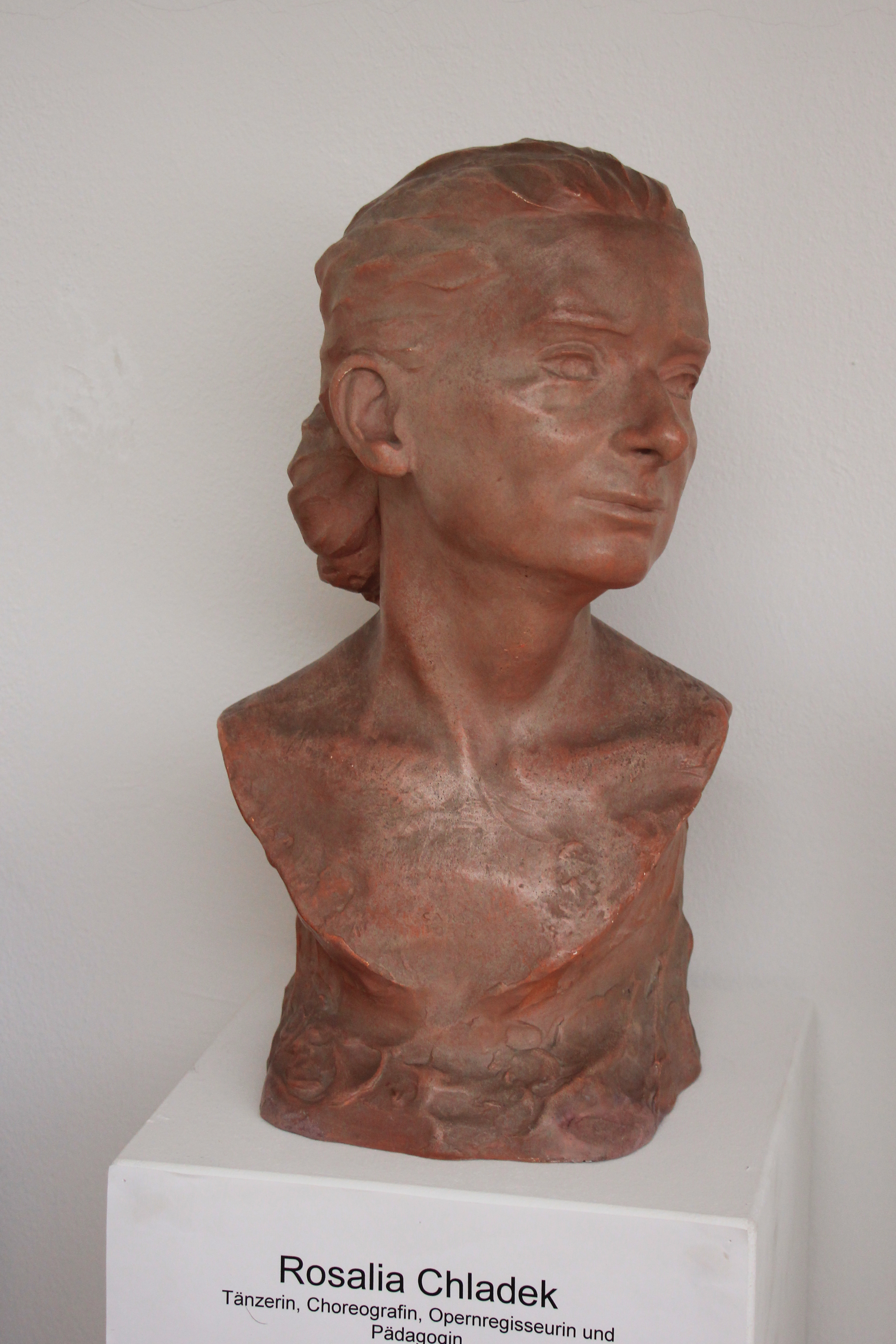 Büste von Rosalia Chladek im Museum Laxenburg, Niederösterreich